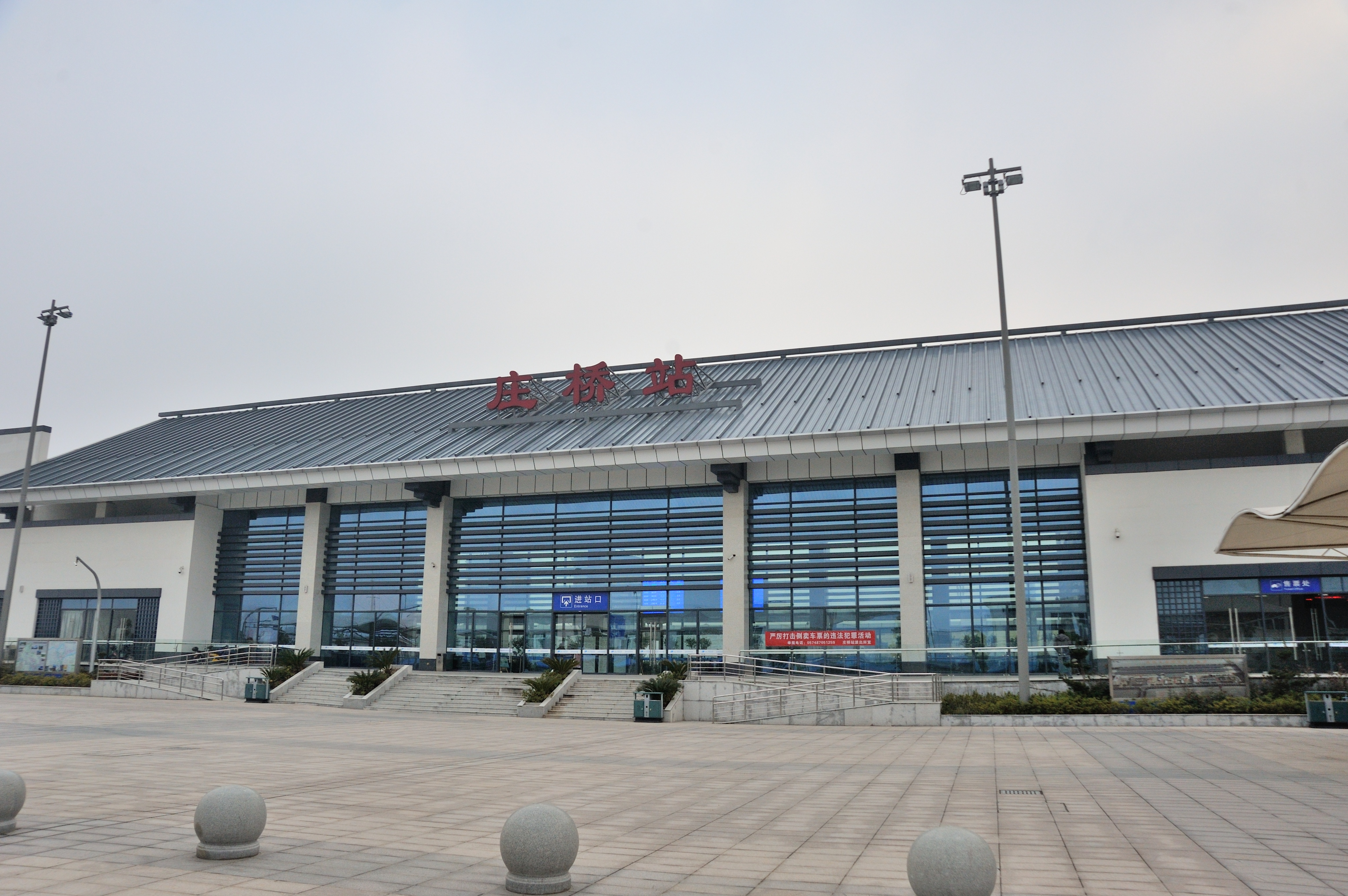 庄桥站前视图